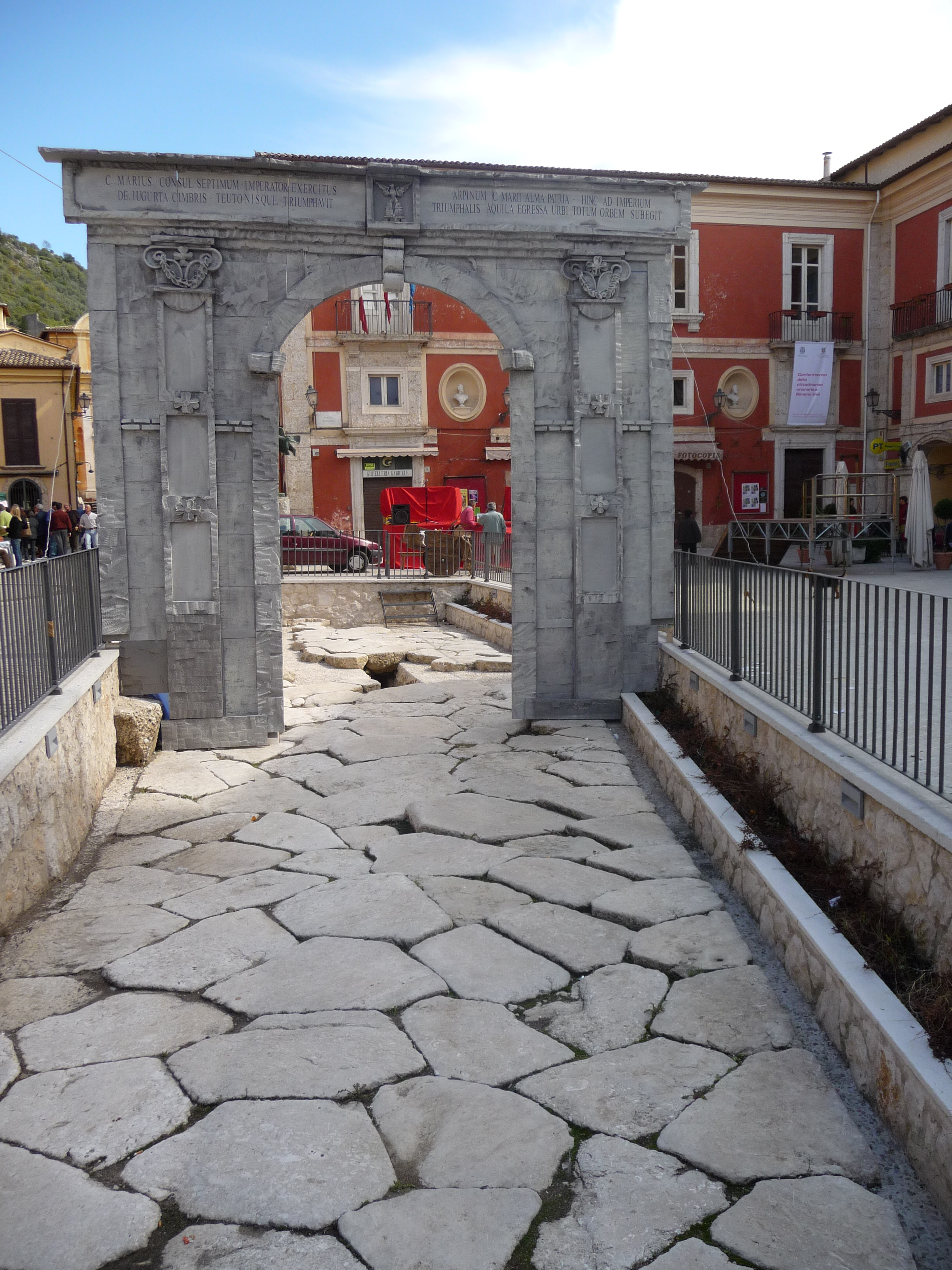 Basolato romano